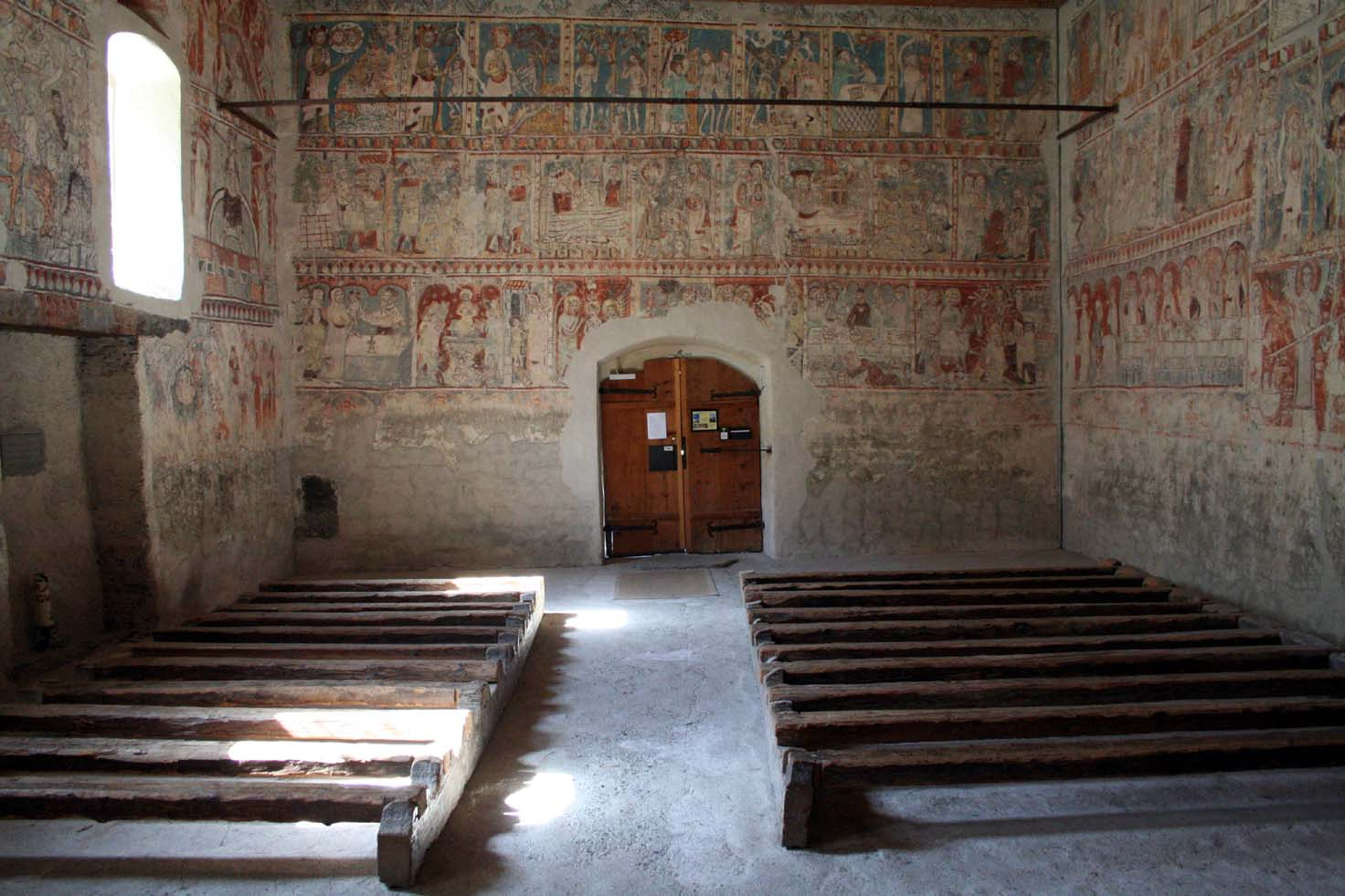 Rückseite